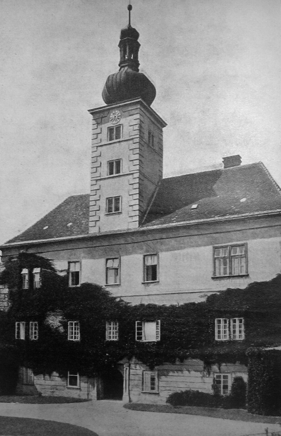 Zámek v Ivanovicích na Hané 1935 (Vyškov District - Czech Republic)